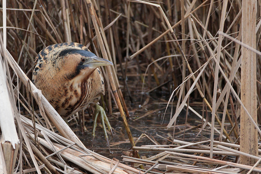 Rohrdommel im Ilkerbruch